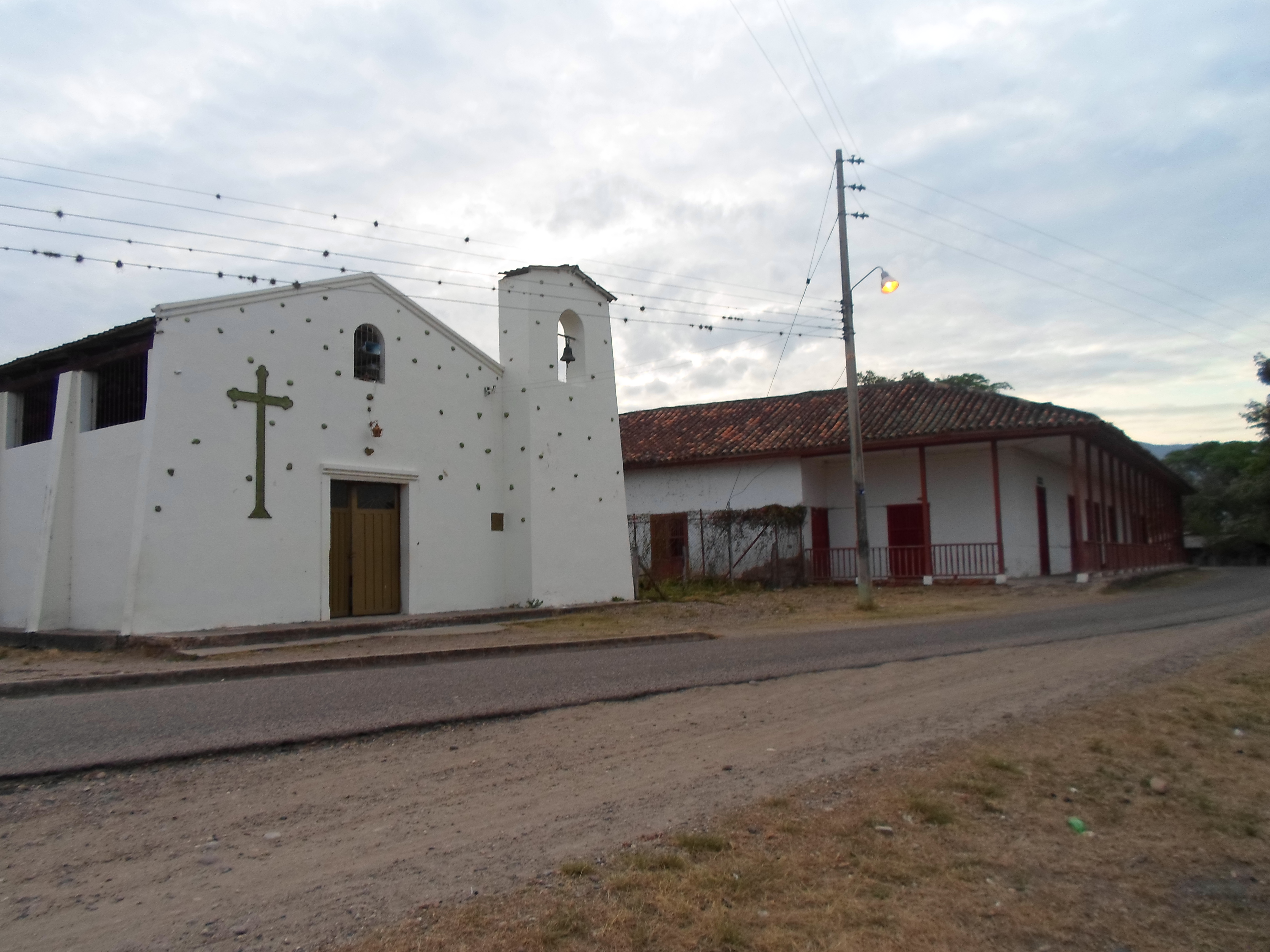 Centro de Paquiló